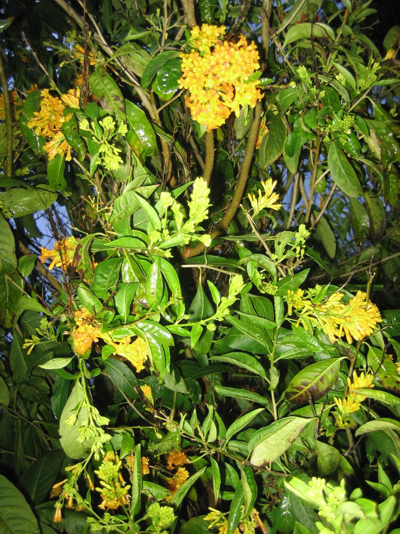 Cestrum-species